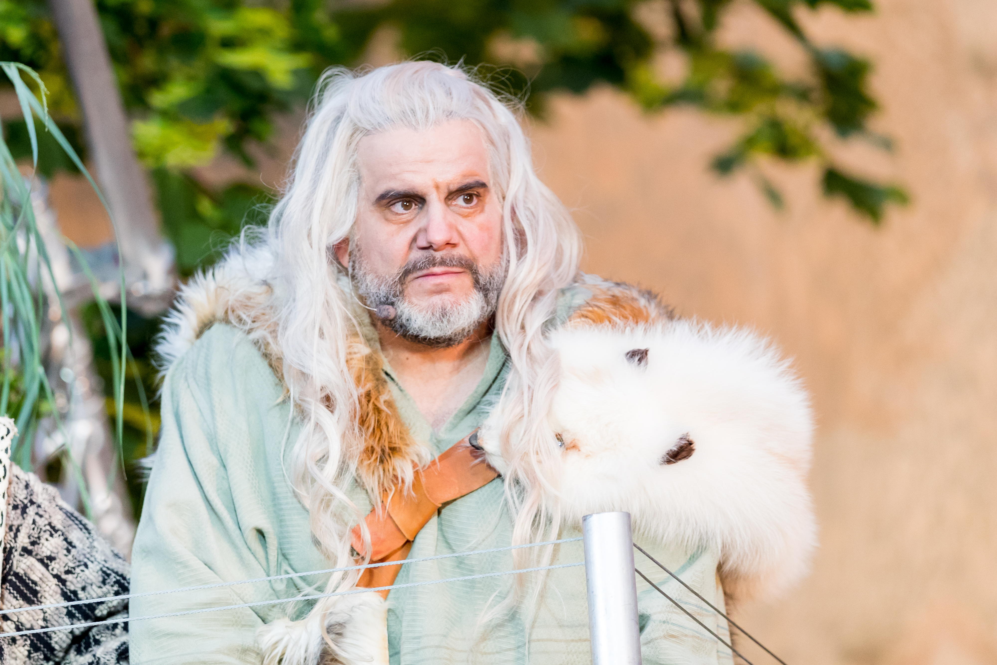 Bruno Cathomas during Nibelungenfestspiele "Siegfrieds Erben" at Wormser Dom, Worms, Rheinland-Pfalz, Germany on 2018-07-19, Photo: Sven Mandel